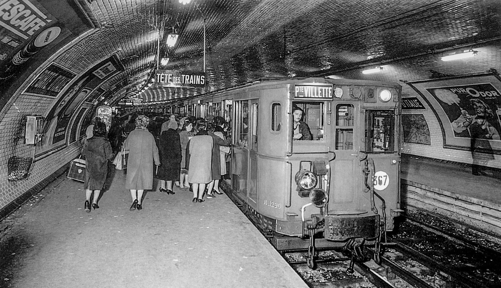 Une rame de la ligne 7 du métro de Paris, France, à la station Porte d'Italie